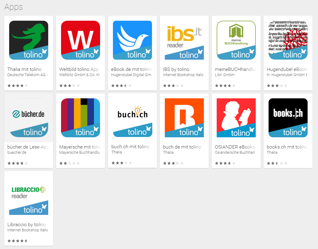 Anbieter der tolino App